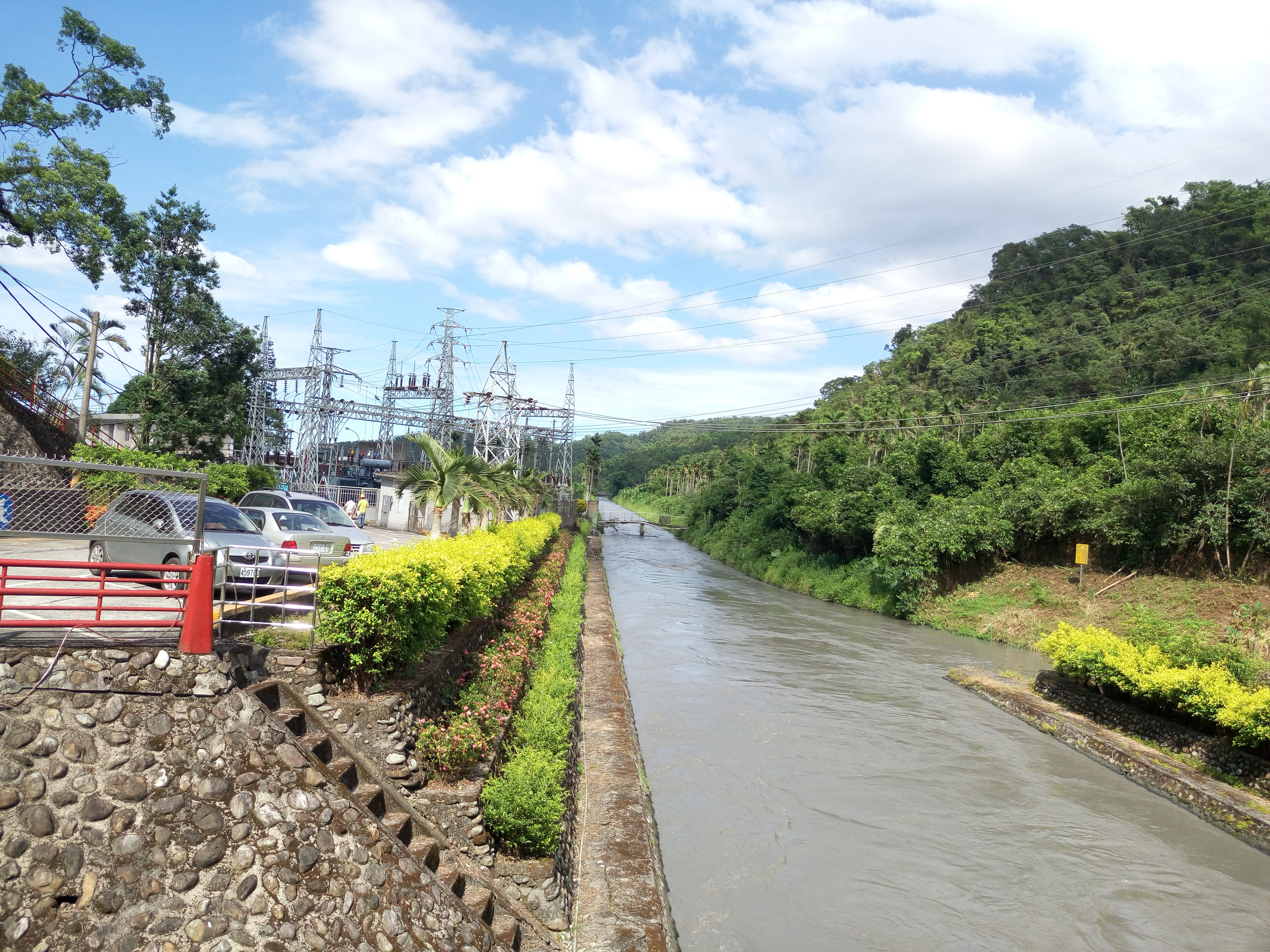 蘭陽發電廠天埤機組發電尾水排放至安農溪